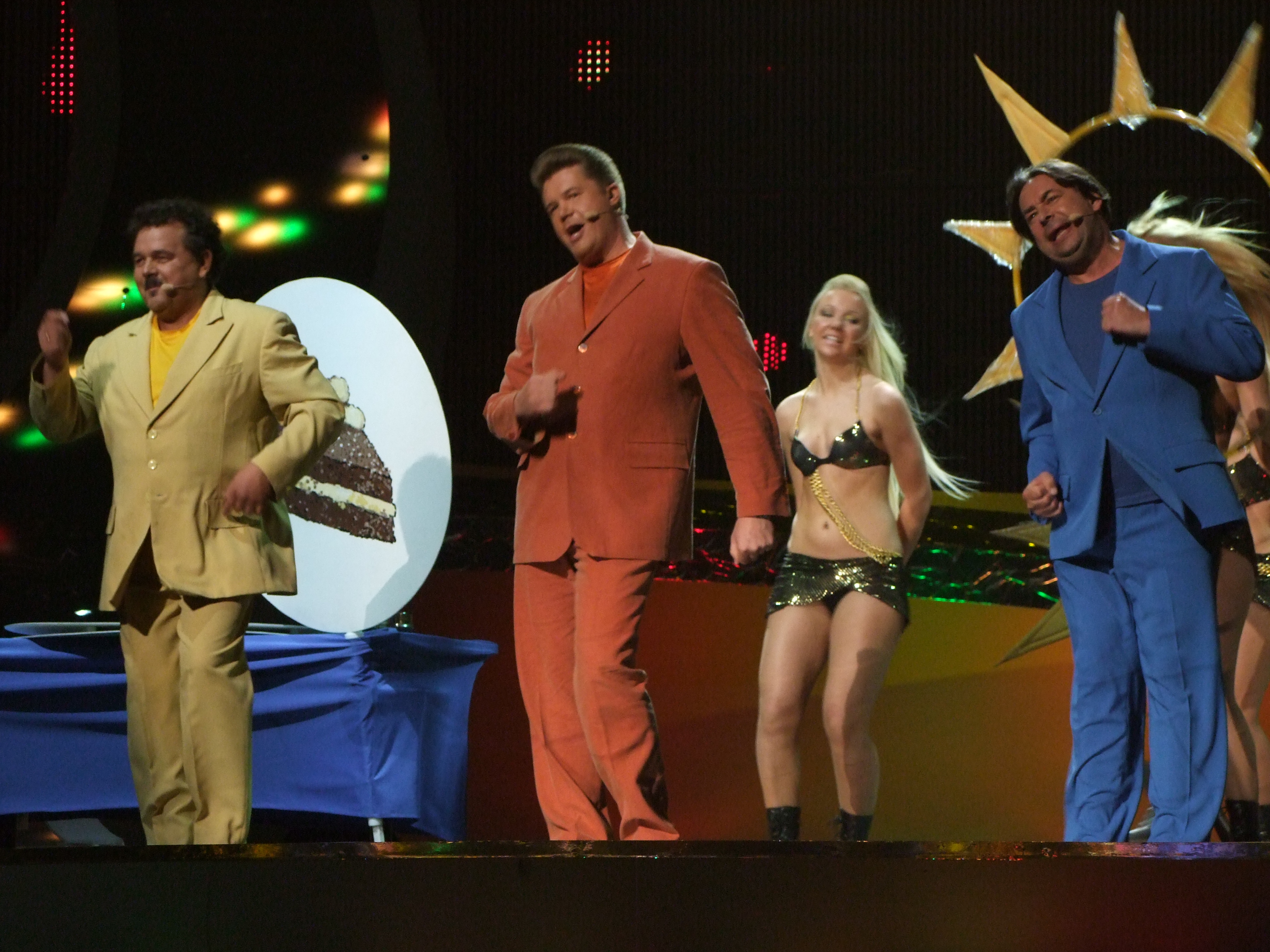 Eurovision Song Contest 2008, 1st semifinalEstonia: Kreisiraadio - Leto svet